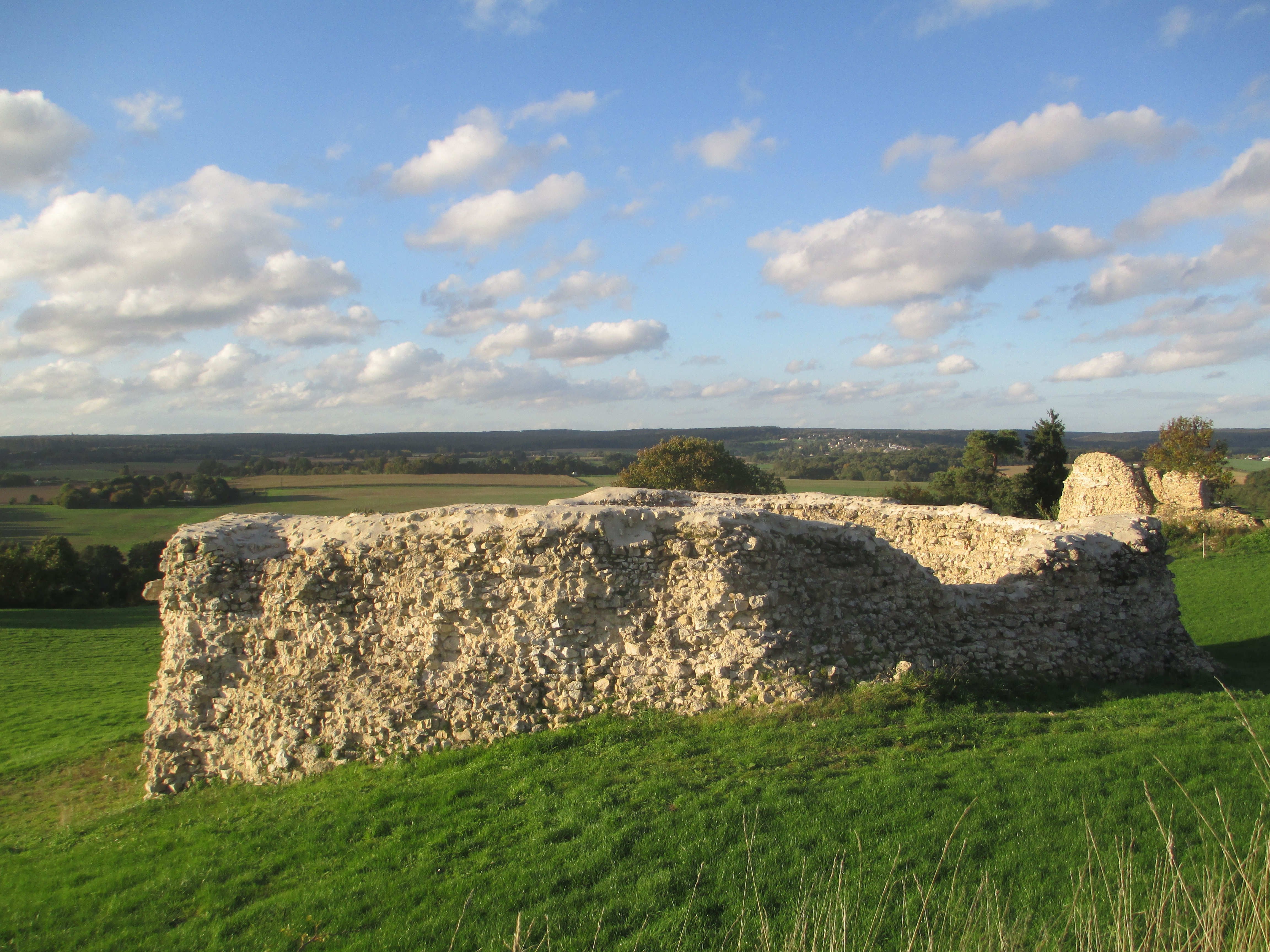 Ruines du château de Saint-Rémy-du-Val, dans la Sarthe.